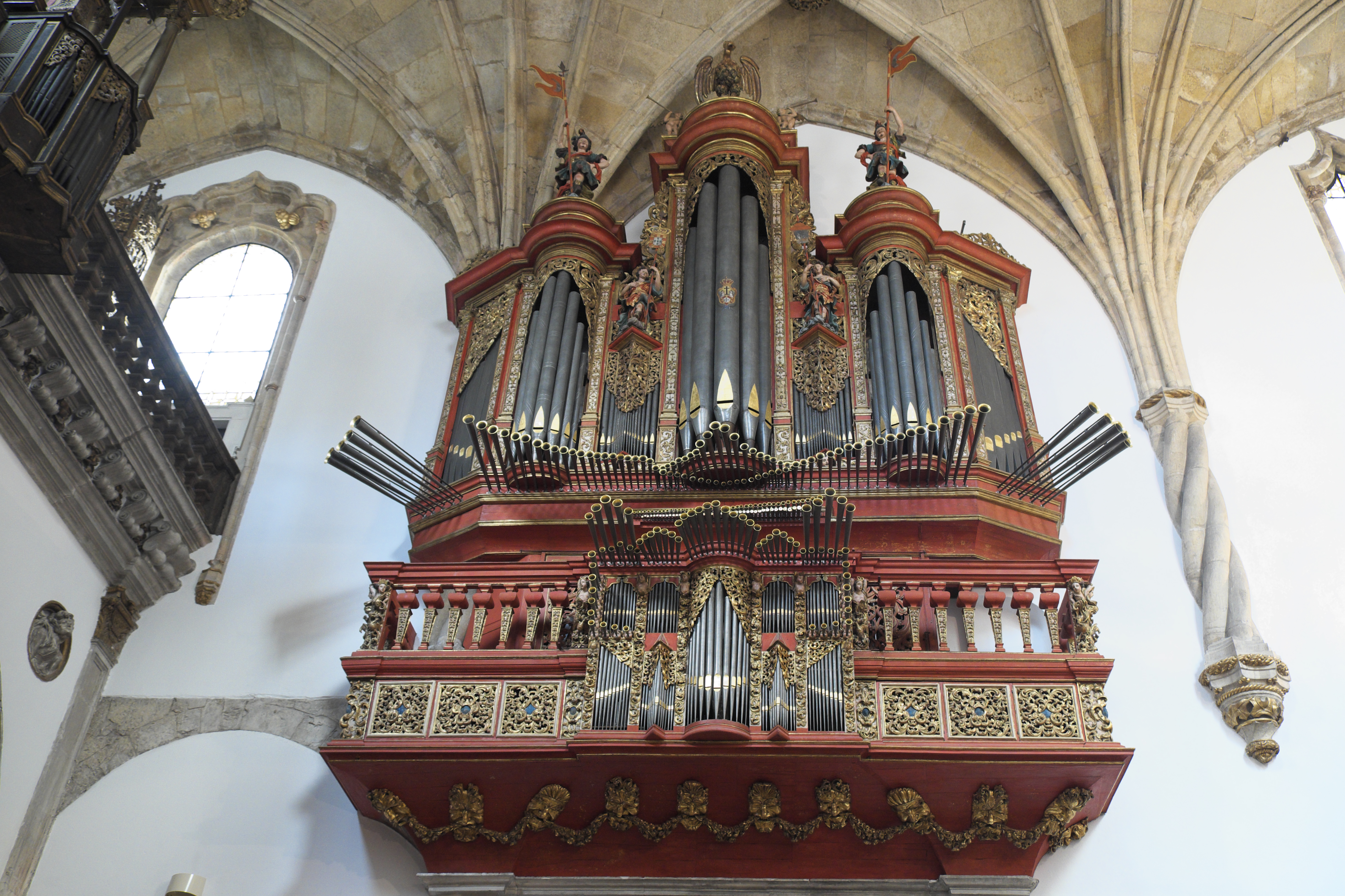 Ehemalige Augustinerchorherrenstiftskirche Santa Cruz in Coimbra (Portugal), Orgel ( Spanische Trompete)